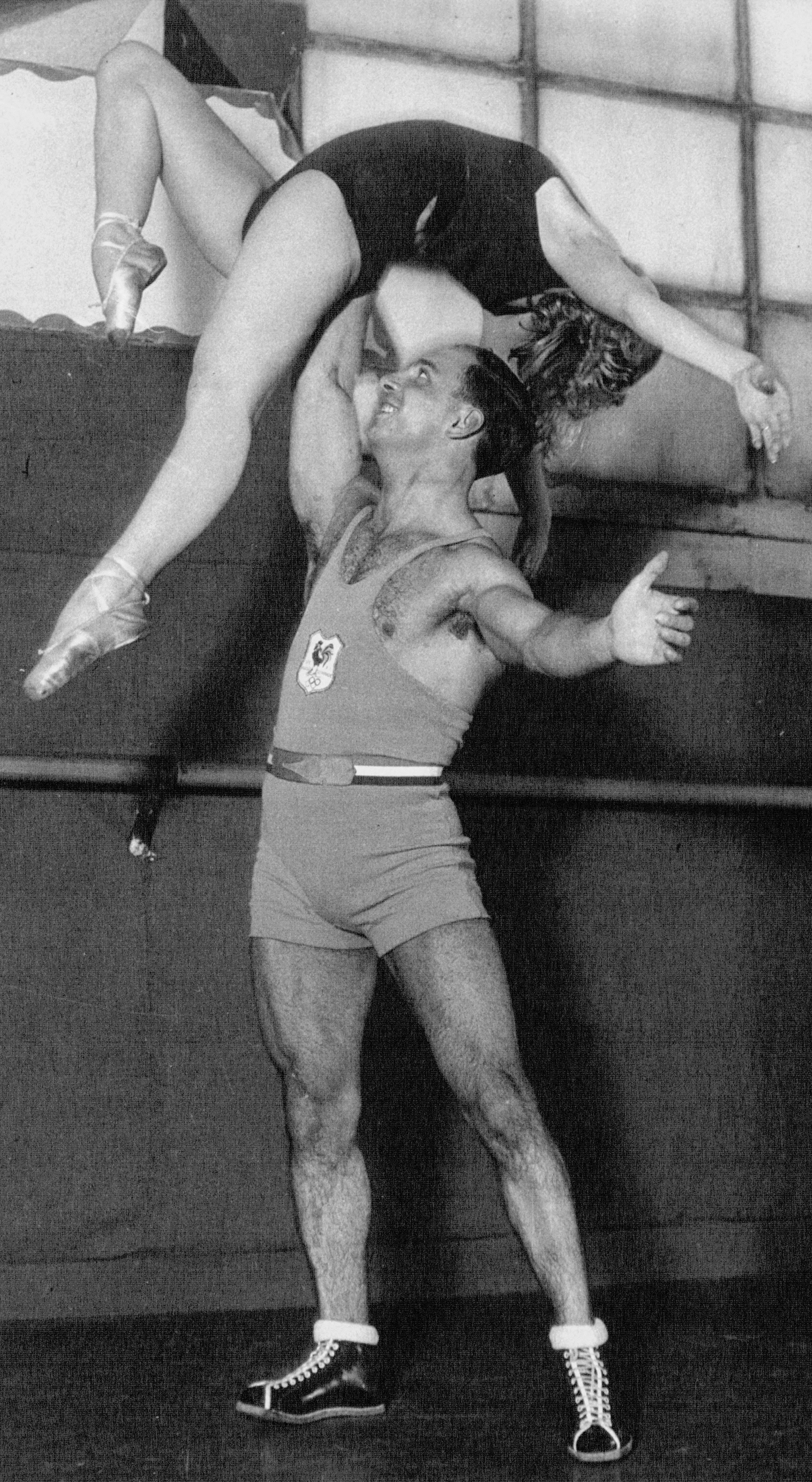 Duverger, champion olympique dans ses exercices de force.